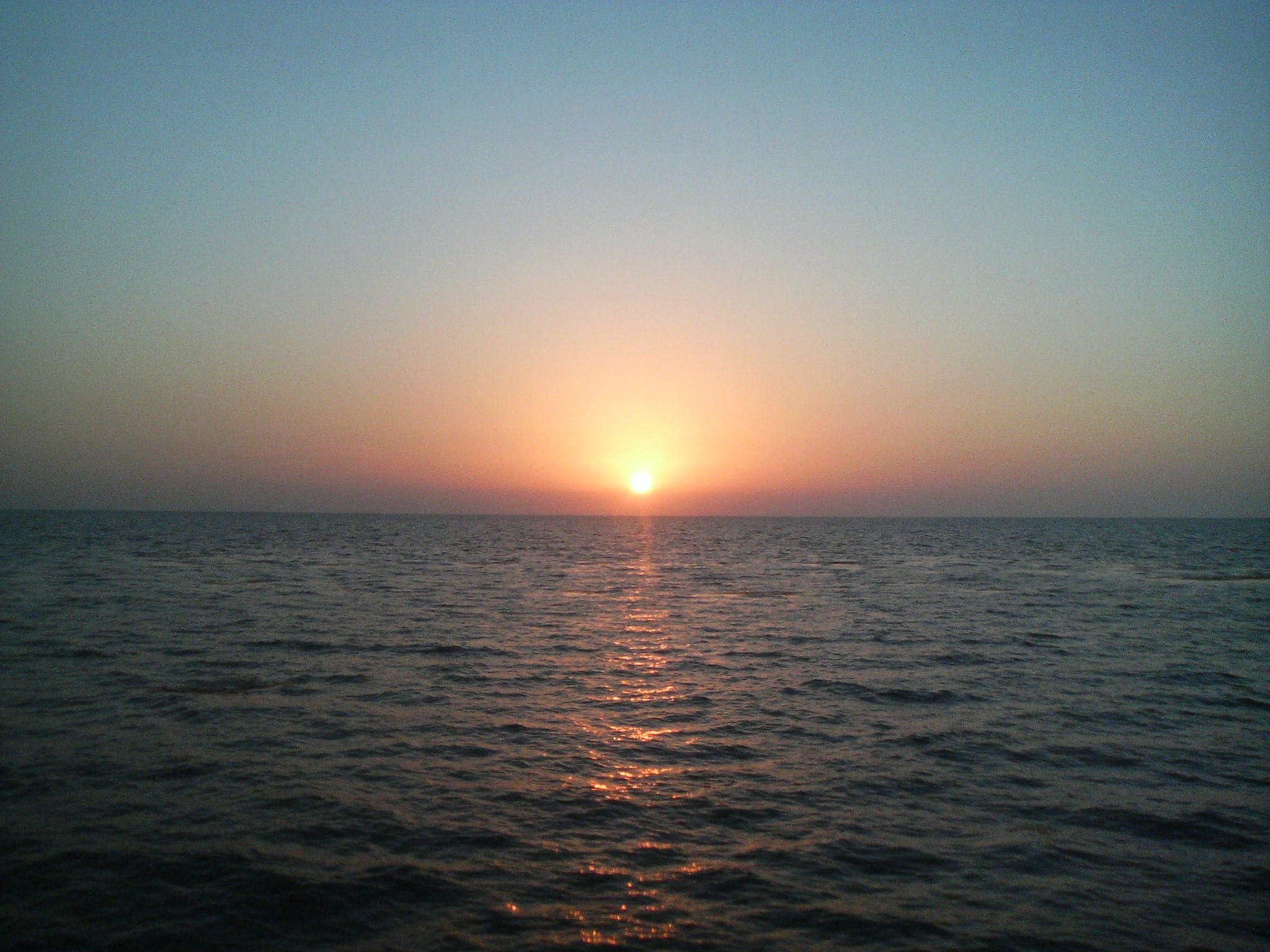 لحظة غروب الشمس من شاطي مدينة جازان جنوب غرب السعودية - الكورنيش الجنوبي